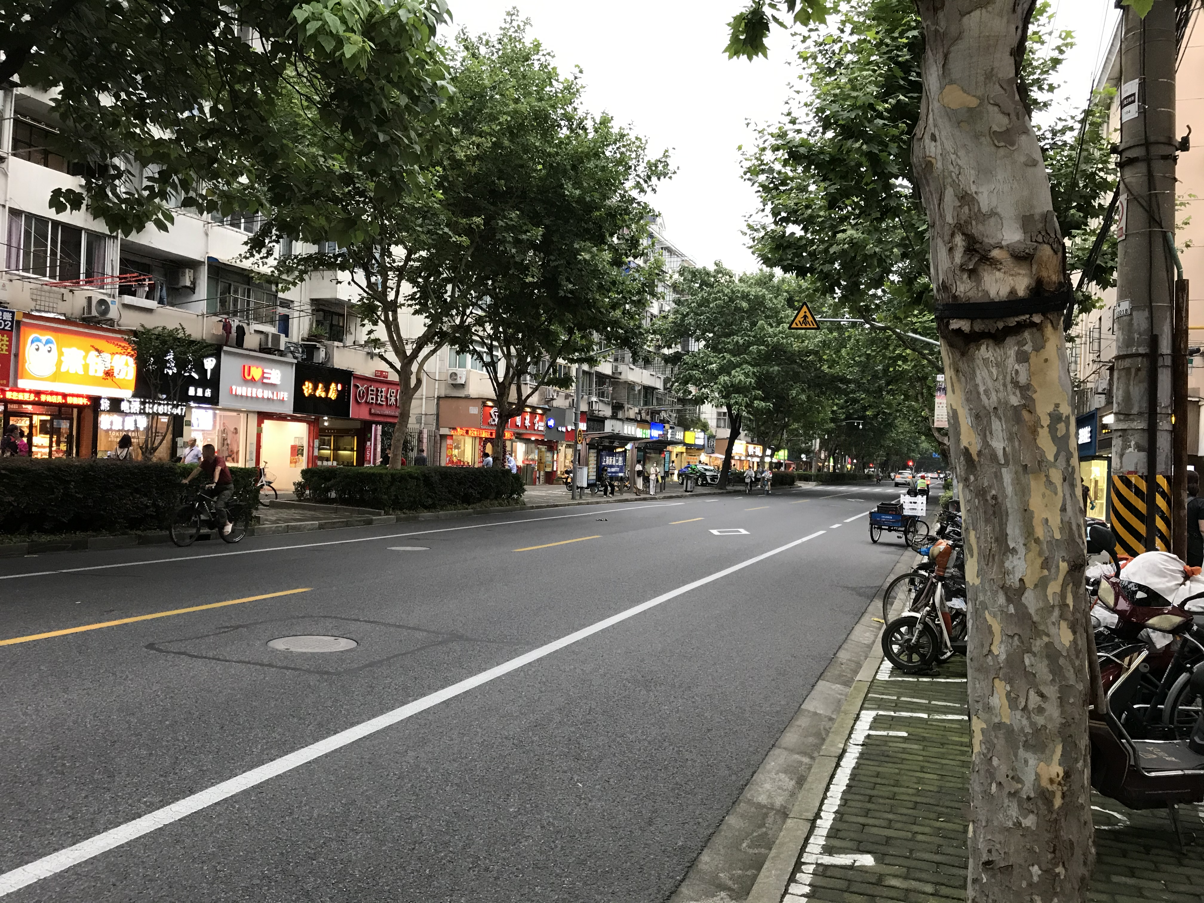 View of Changli Road,Shanghai,上海昌里路街景 June 2020